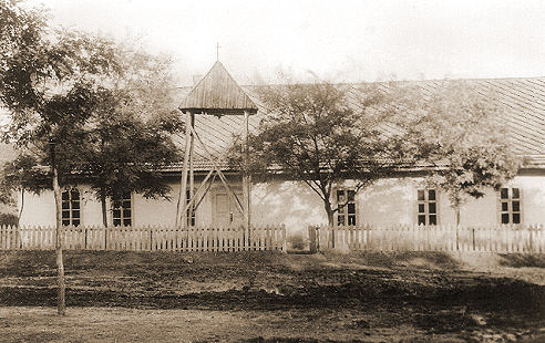 Bethaus von 1903 der bessarabiendeutschen Siedlung Hannowka